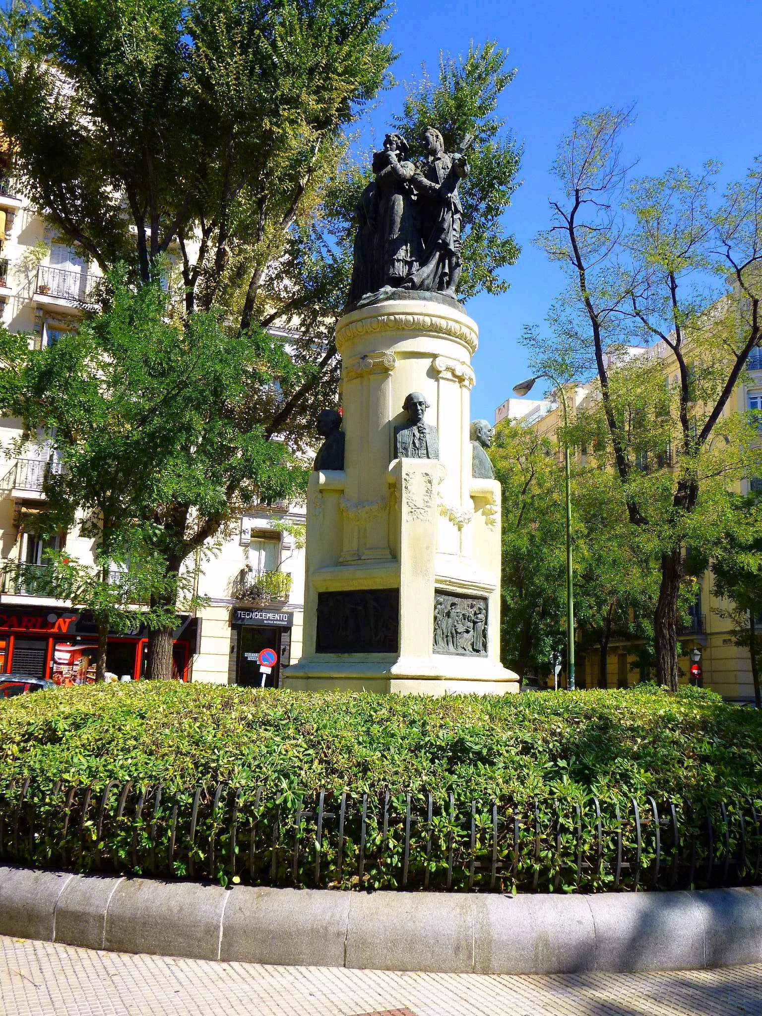 Monumento a los Saineteros Madrileños, en el barrio de Chamberí de Madrid